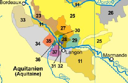 Bildbeschreibung: Karte Weinbaugebiet Bordeaux * Quelle: selbst erstellt * Zeichner: Domenico-de-ga * Datum: 24. Mai 2006 ==================================================== Cropping of Bordeaux wine map to just focus on the dessert wine districts. Reference original map for the numbers.